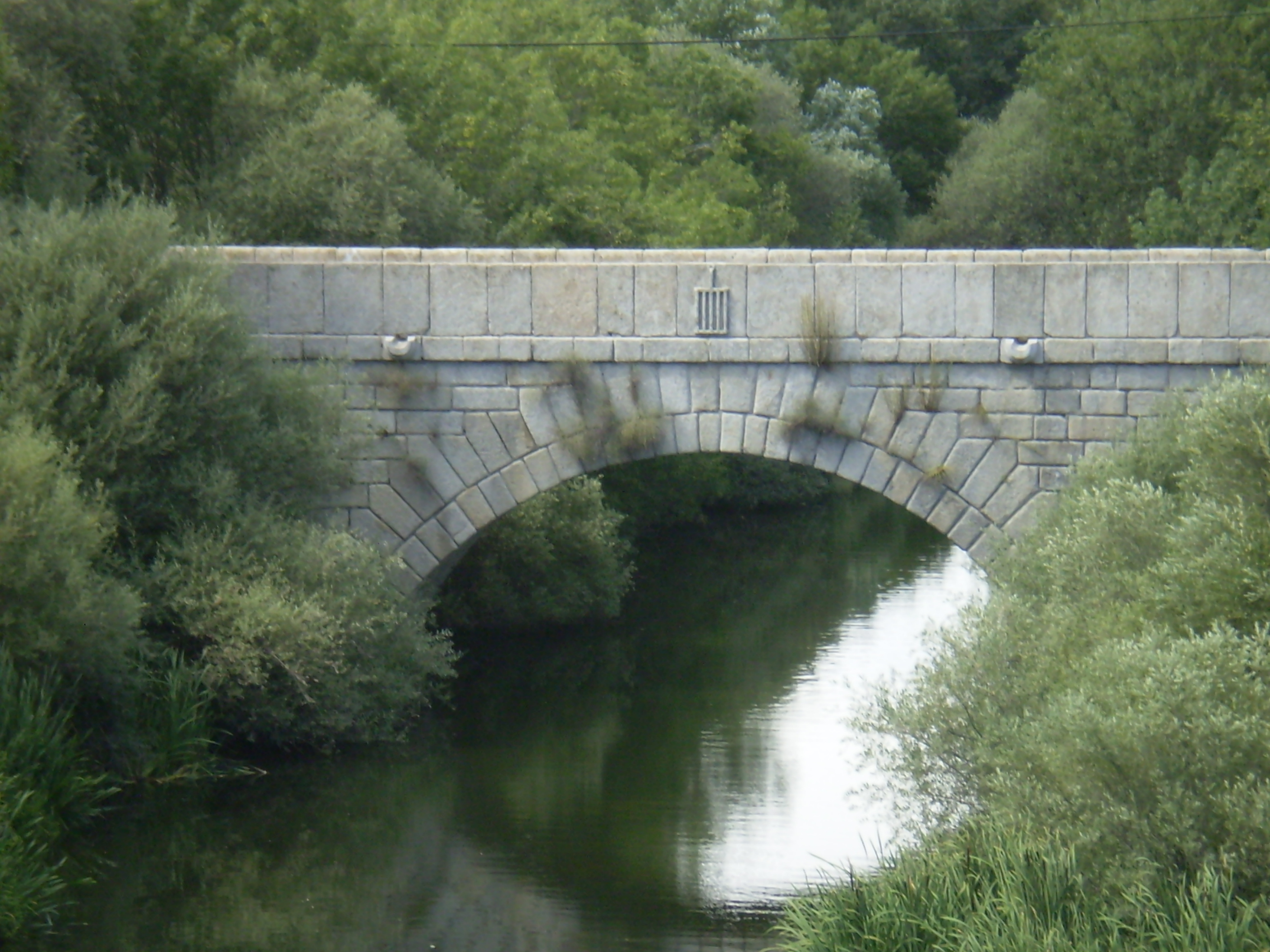 Puente Nuevo over Guadarrama River. Galapagar. Comunidad de Madrid, Spain